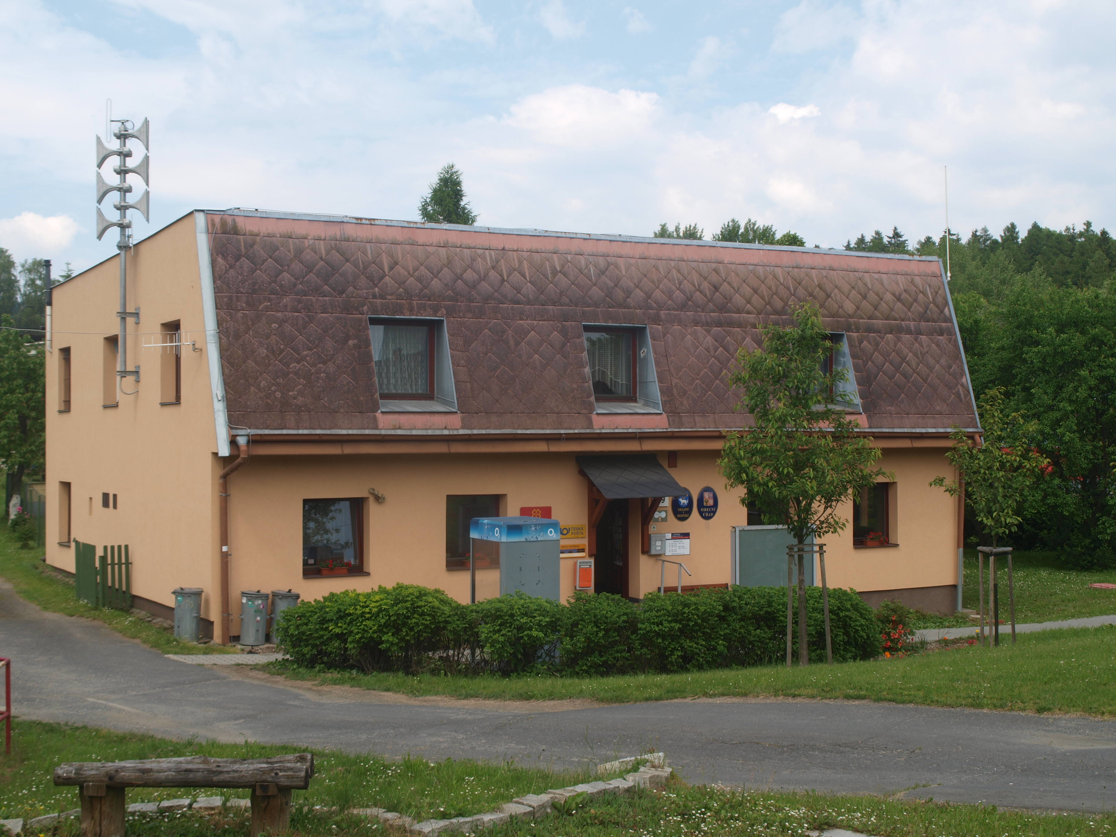 Obecní úřad ve Václavově u Bruntálu.